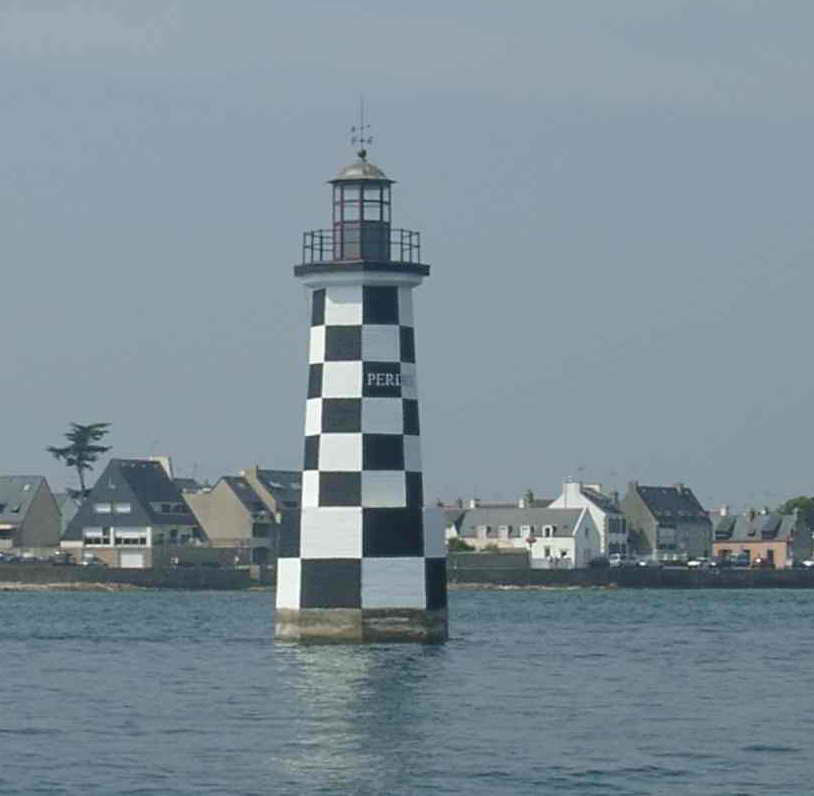 Description : Feu des Perdrix à Loctudy Lieu : Loctudy, Bretagne, France Auteur : Pline Photo personnelle